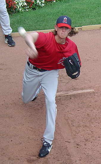 Jered Weaver